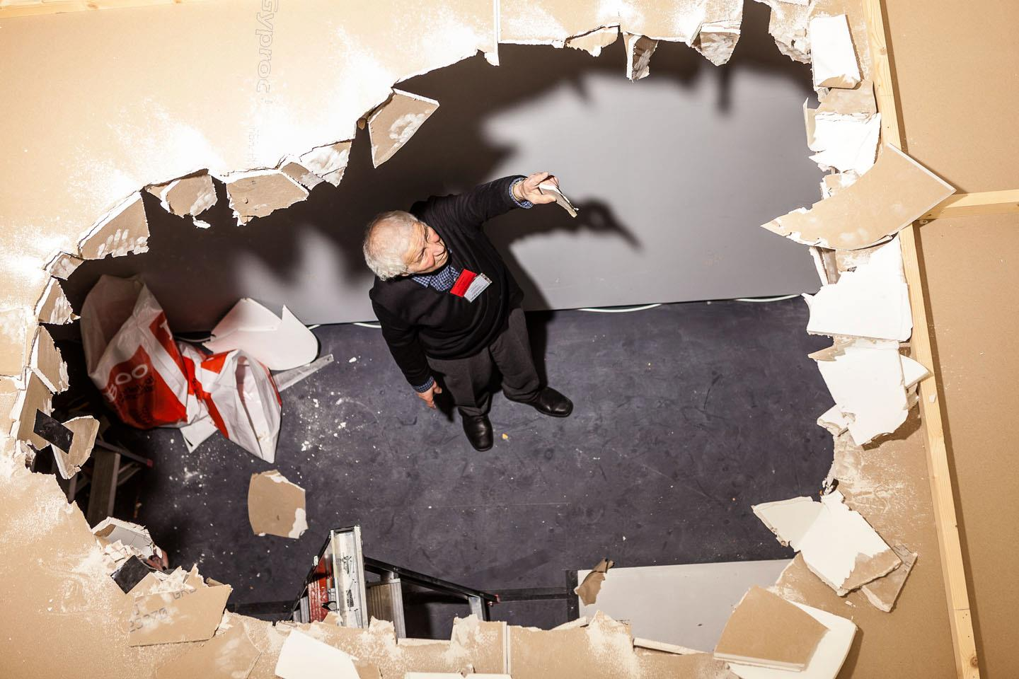 Ilya Kabakov dóna instruccions per a la instal·lació de la seva obra "The Man Who Flew in to Space From His Apartment"("L'home que va volar a l'espai des del seu apartament")